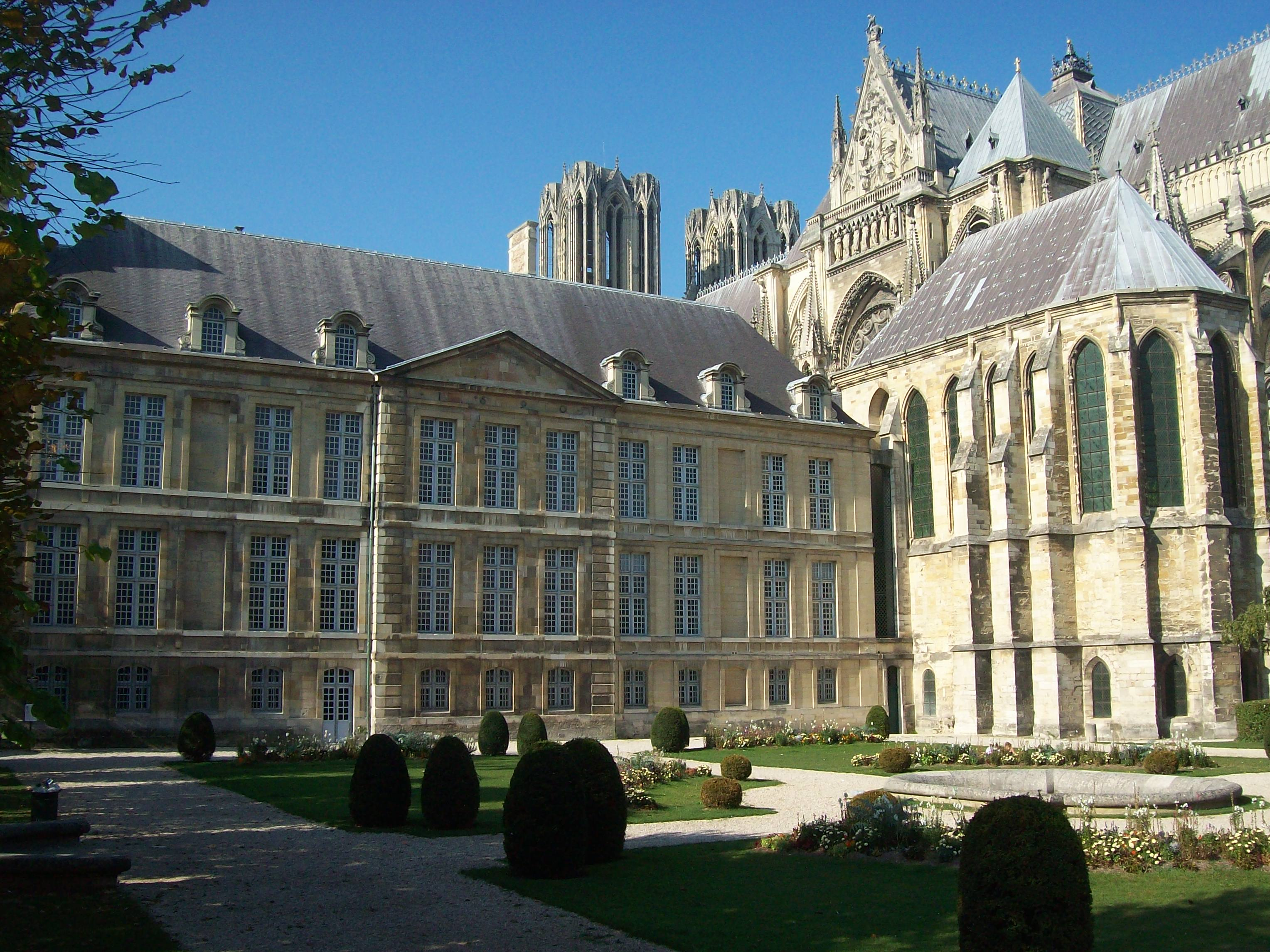 Le Palais du Tau vu des jardins — Reims, Champagne-Ardenne, France